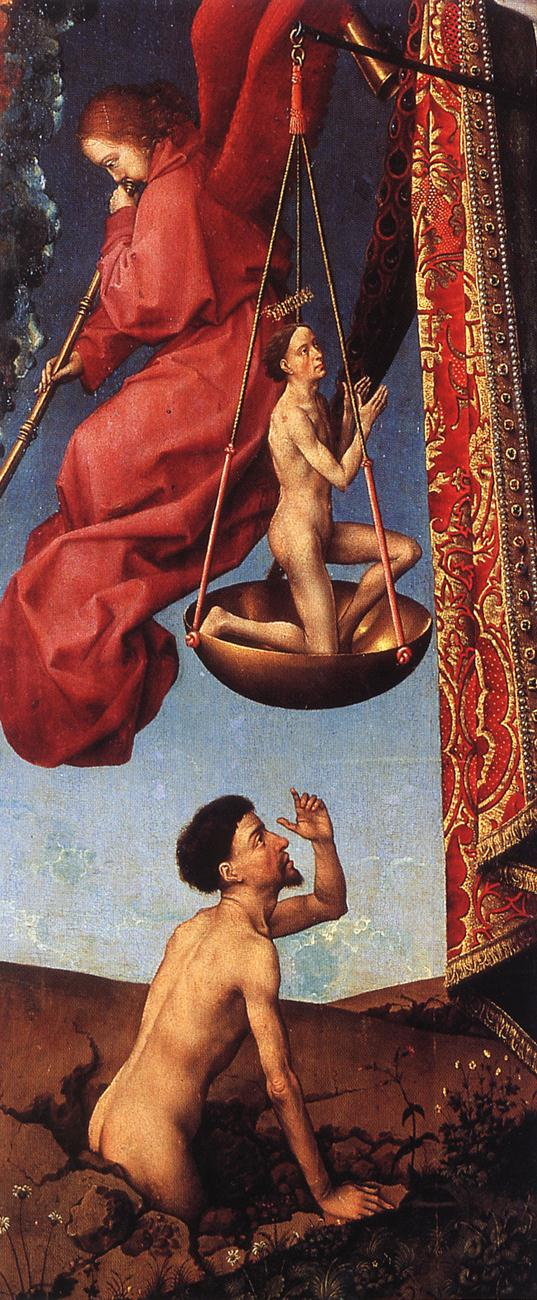 detail